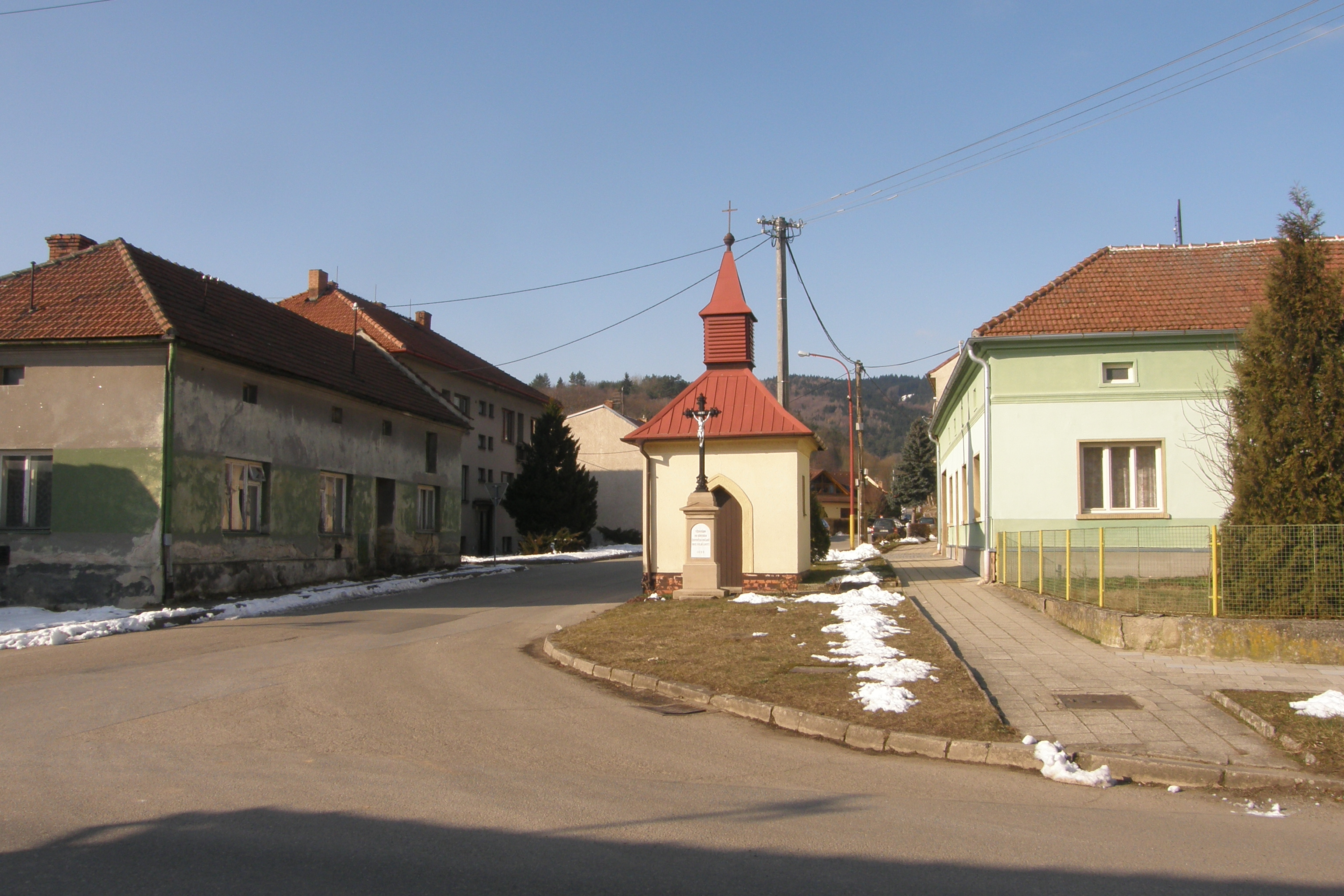 Dolní Lhota